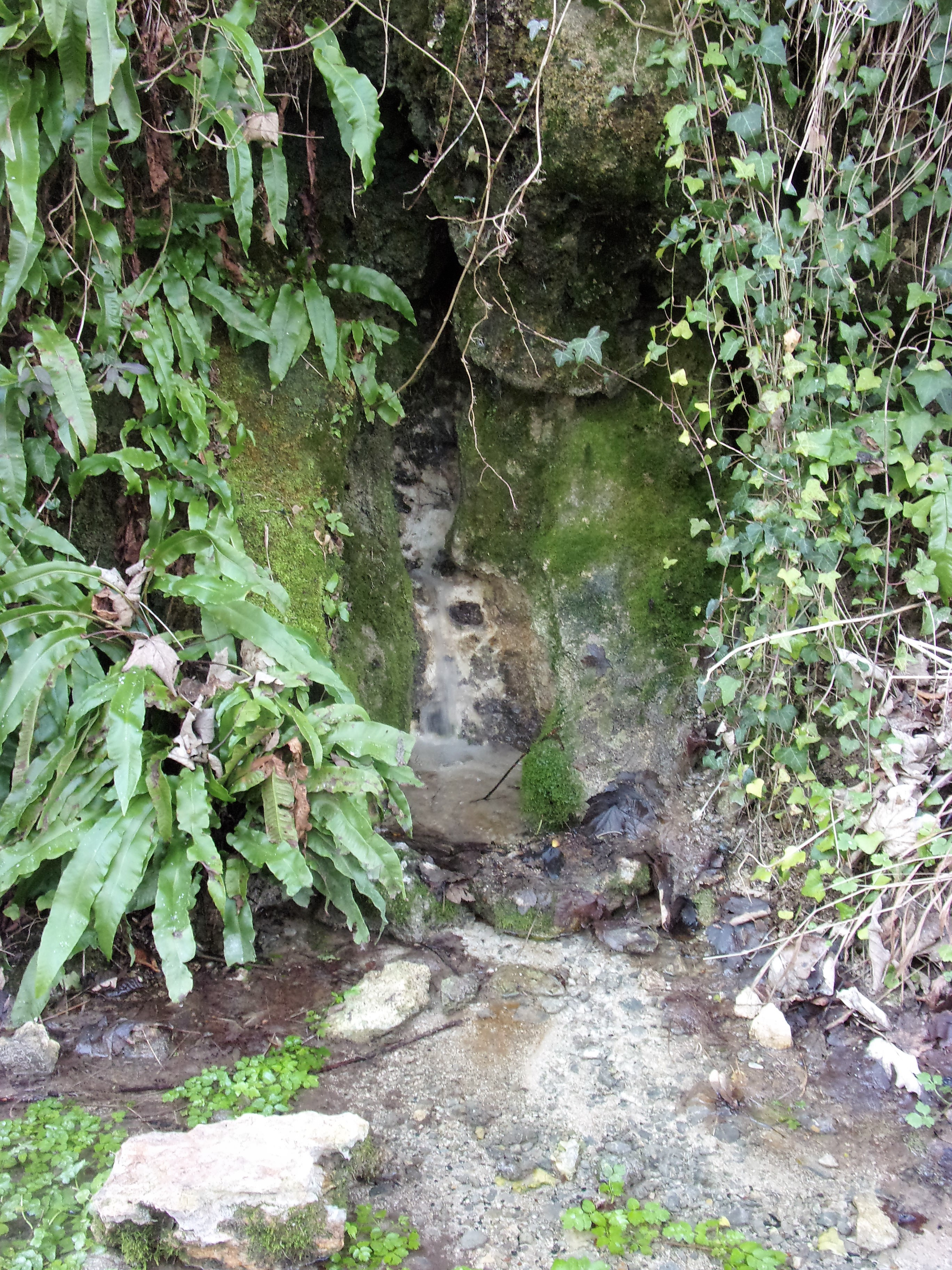 Sources tuffeuses du Perrion